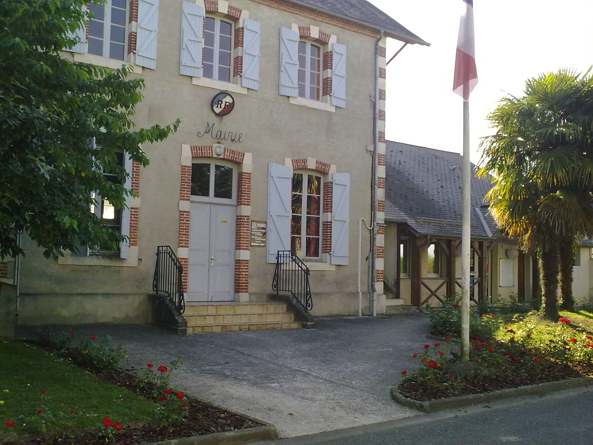 Mairie de Sévignacq.